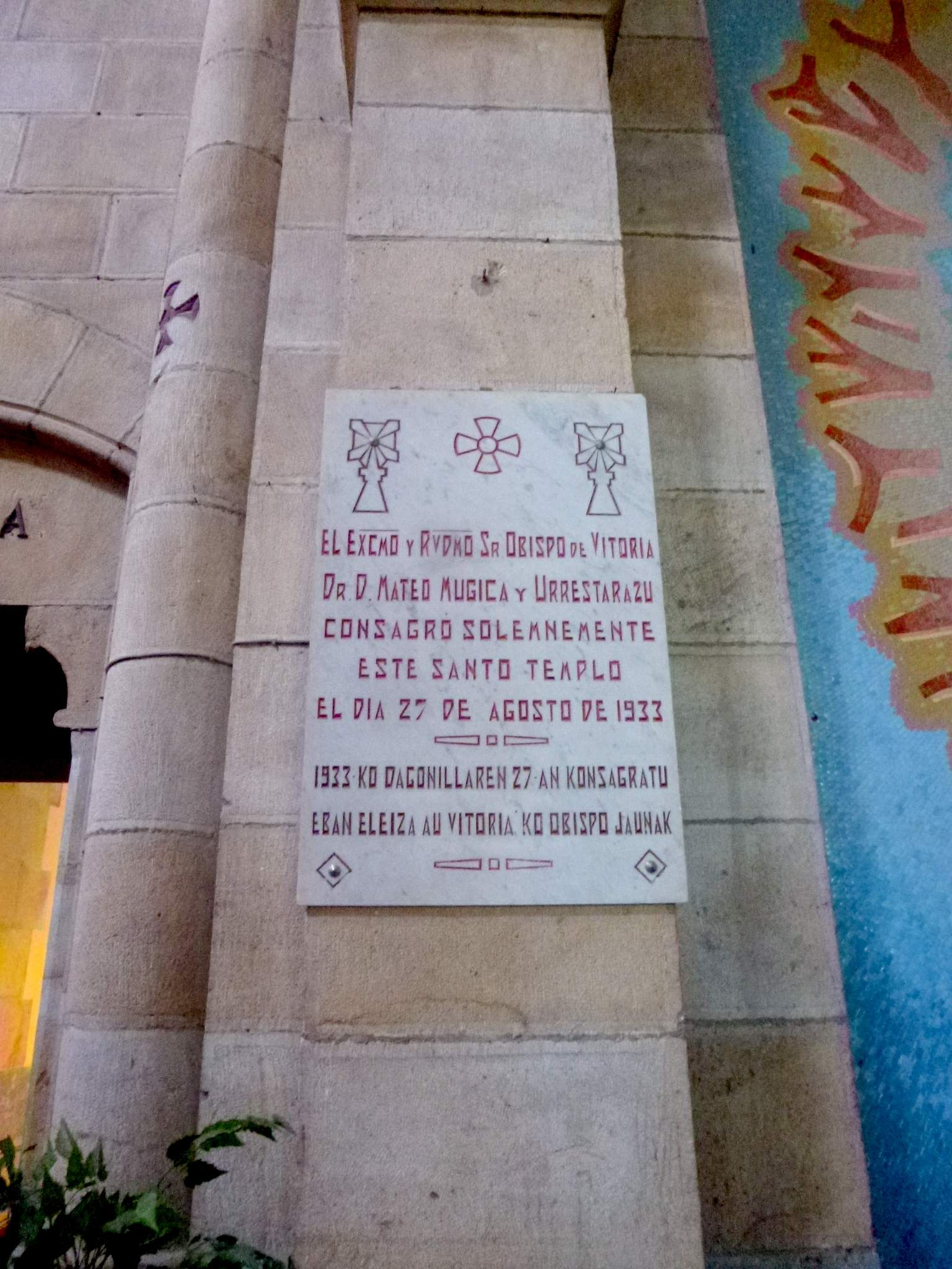 Santuario de Urkiola (Bizkaia)